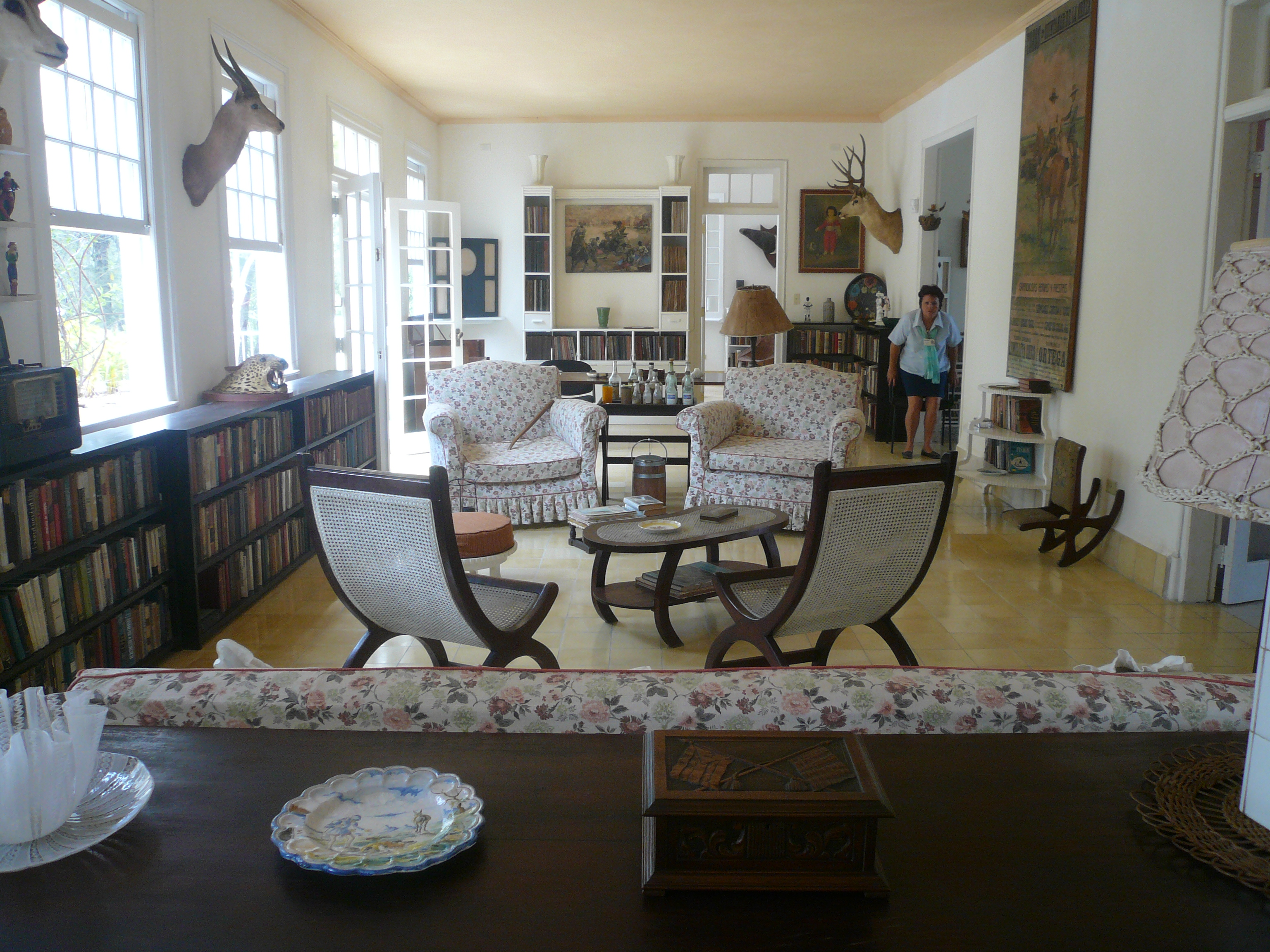 Finca La Vigía (Haus Hemingways in Kuba)